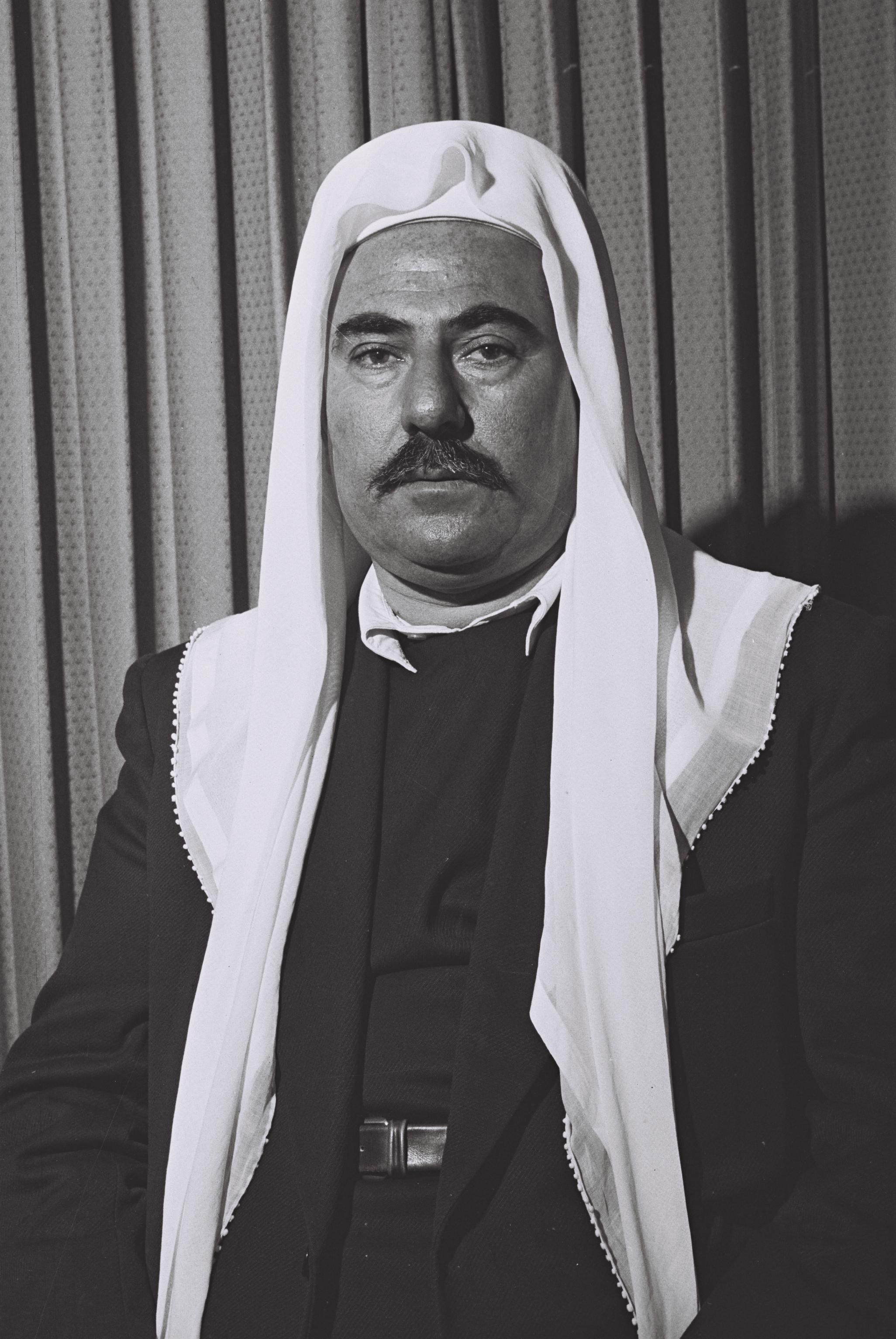 Labib Hussein Abu Rokan